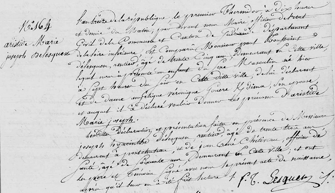 Acte de naissance d'Aristide Marie Joseph Délesquen